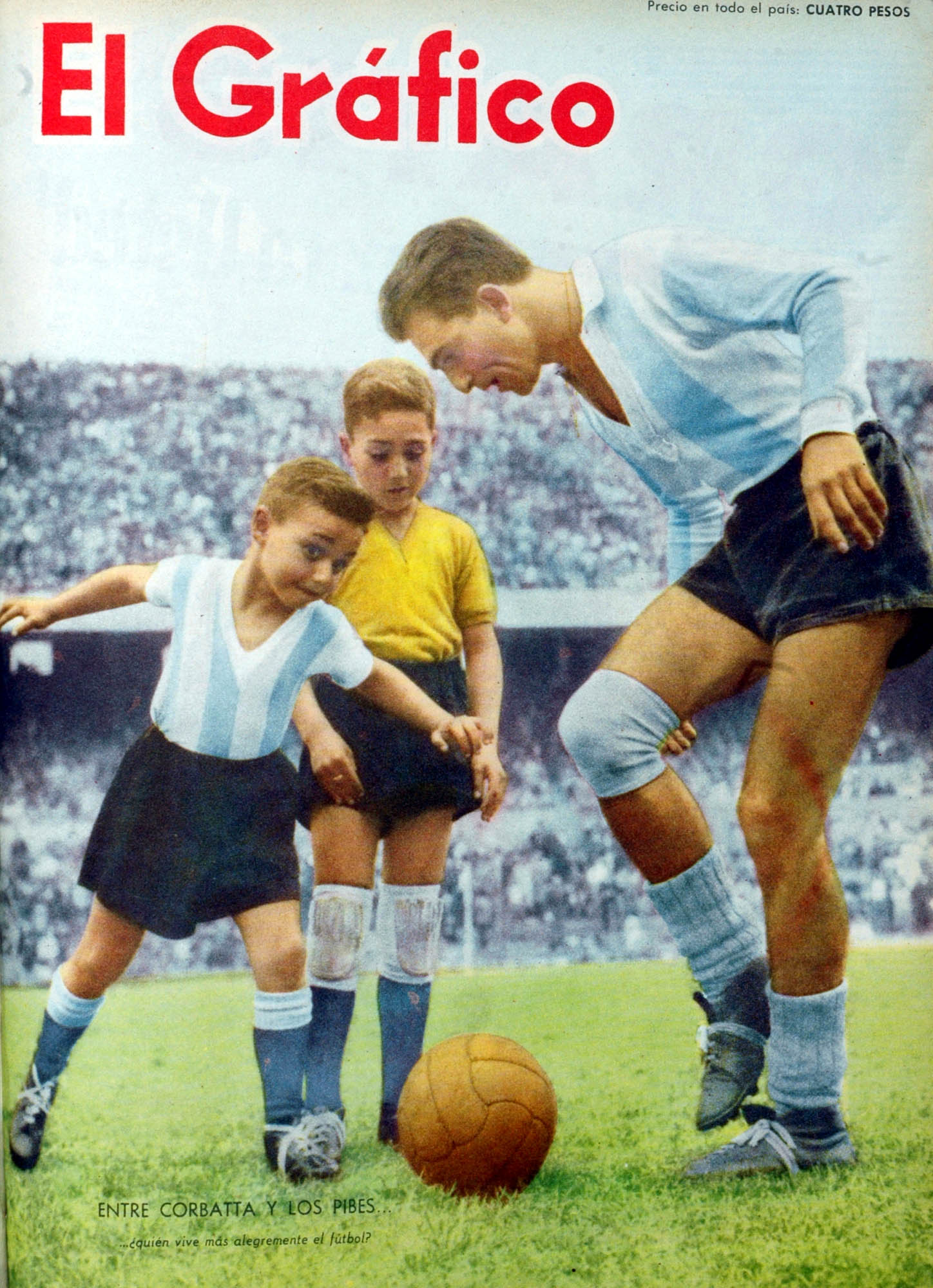 El Grafico del 12 de Marzo de 1959. Edicion 2061